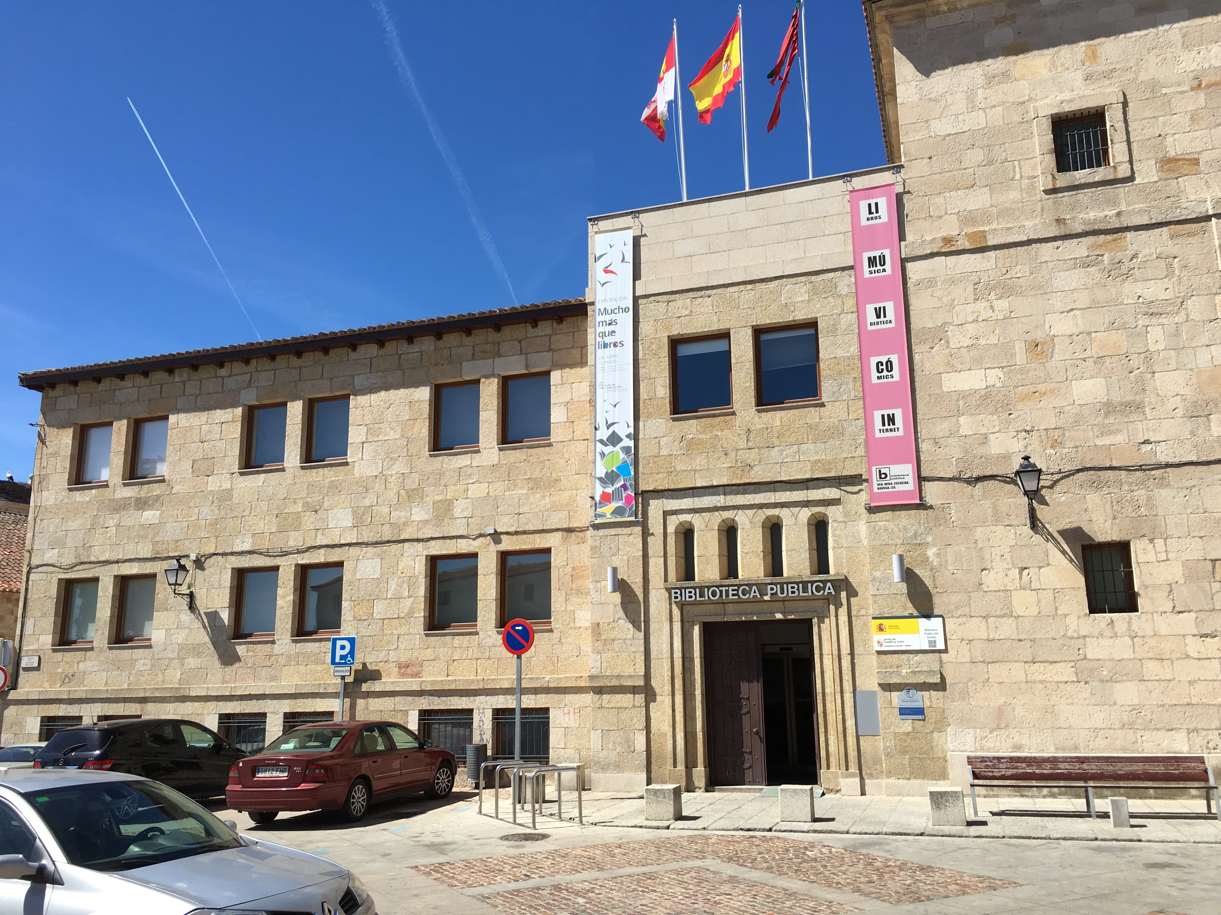 Fachada de la Biblioteca